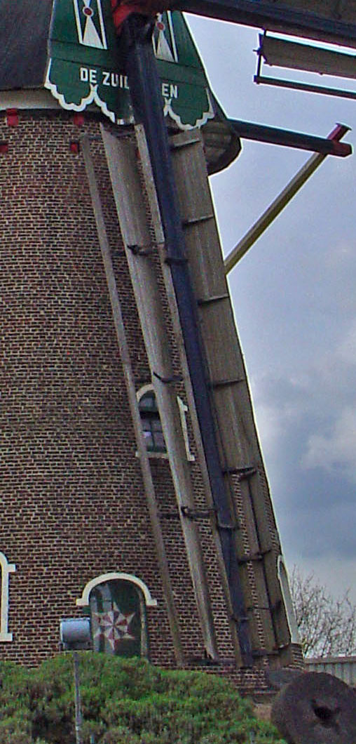 Zuidmolen van Groesbeek Gelderland cropped Zuidmolen van Groesbeek Gelderland